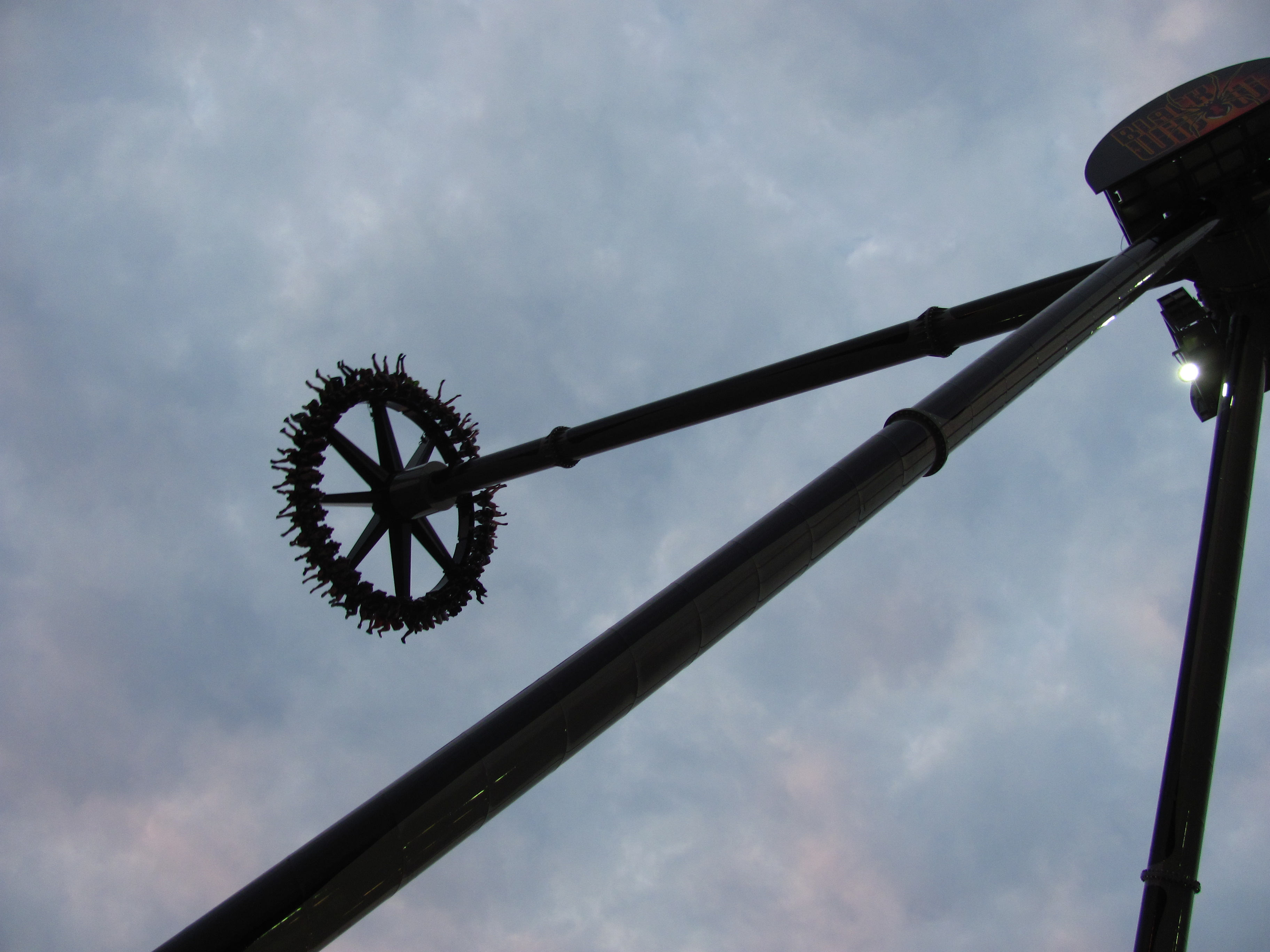 Kennywood 074